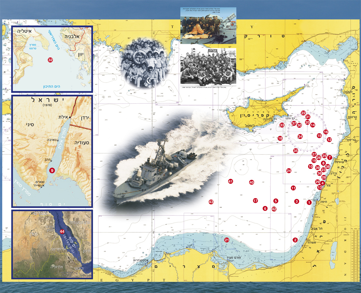 מפת מזרח הים התיכון עם סימון נקודות יירוט כלי שיט העוסקים בהעברת טרוריסטים וחמרי חבלה